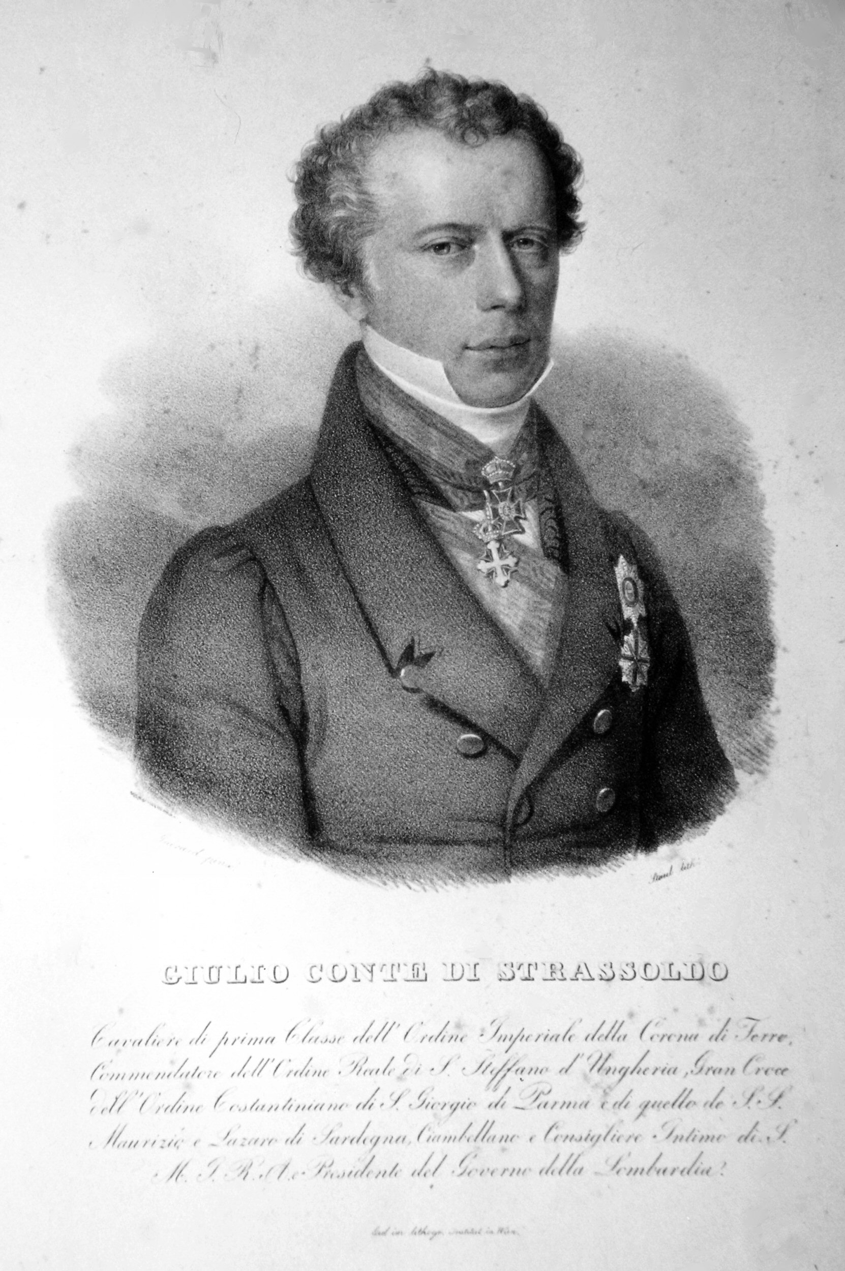 Julius Graf Strassoldo (1773-1830), Kämmerer, Geheimrat, Regierungspräsident der Lombardei, Ritter des Ordens der Eisernen Krone etc. Lithographie, nach einem Gemälde.